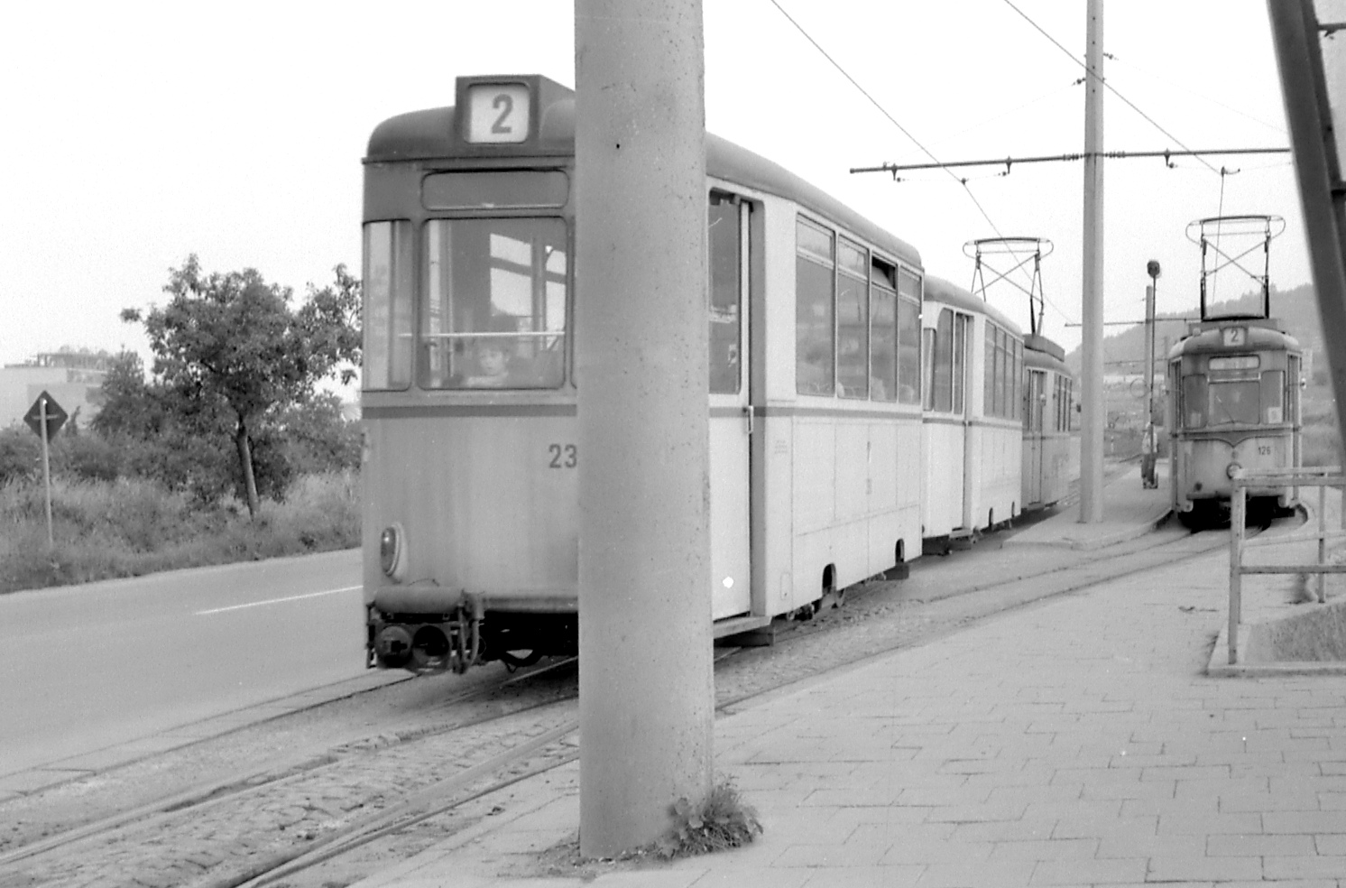 Die 1971 erbaute Ausweichstelle am Kerbelweg im Sommer 1979